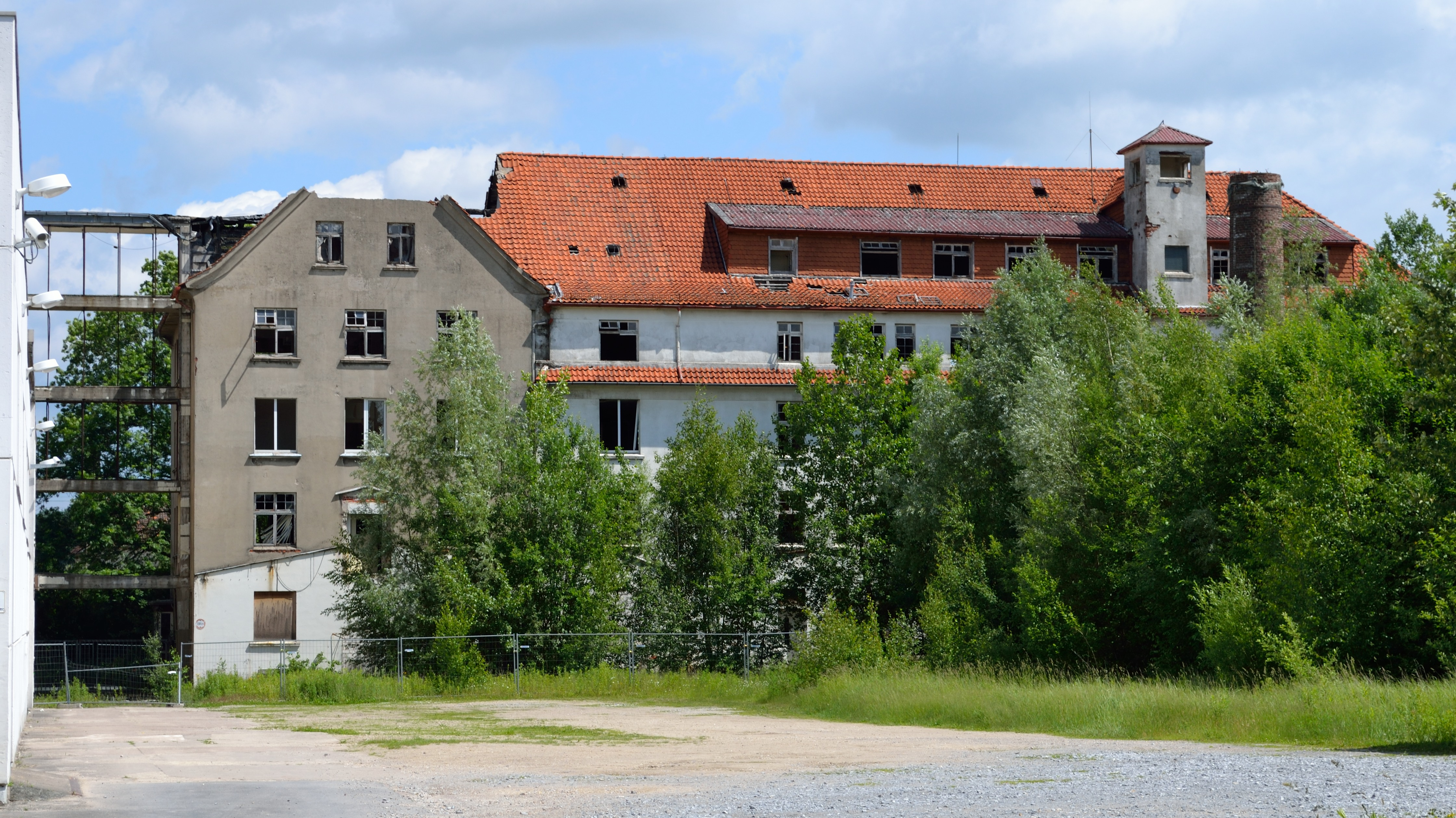 Ruine der ehemaligen Firma Temde-Leuchten in Detmold (Südseite)